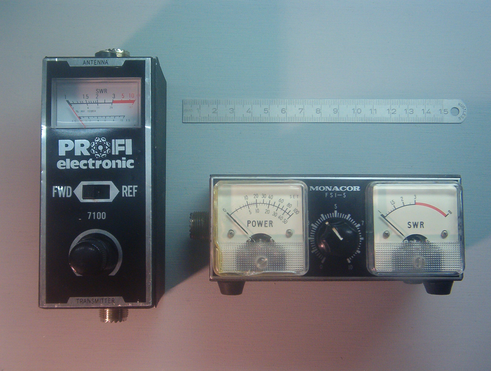 Zwei Stehwellenmessgeräte bis 150 MHz